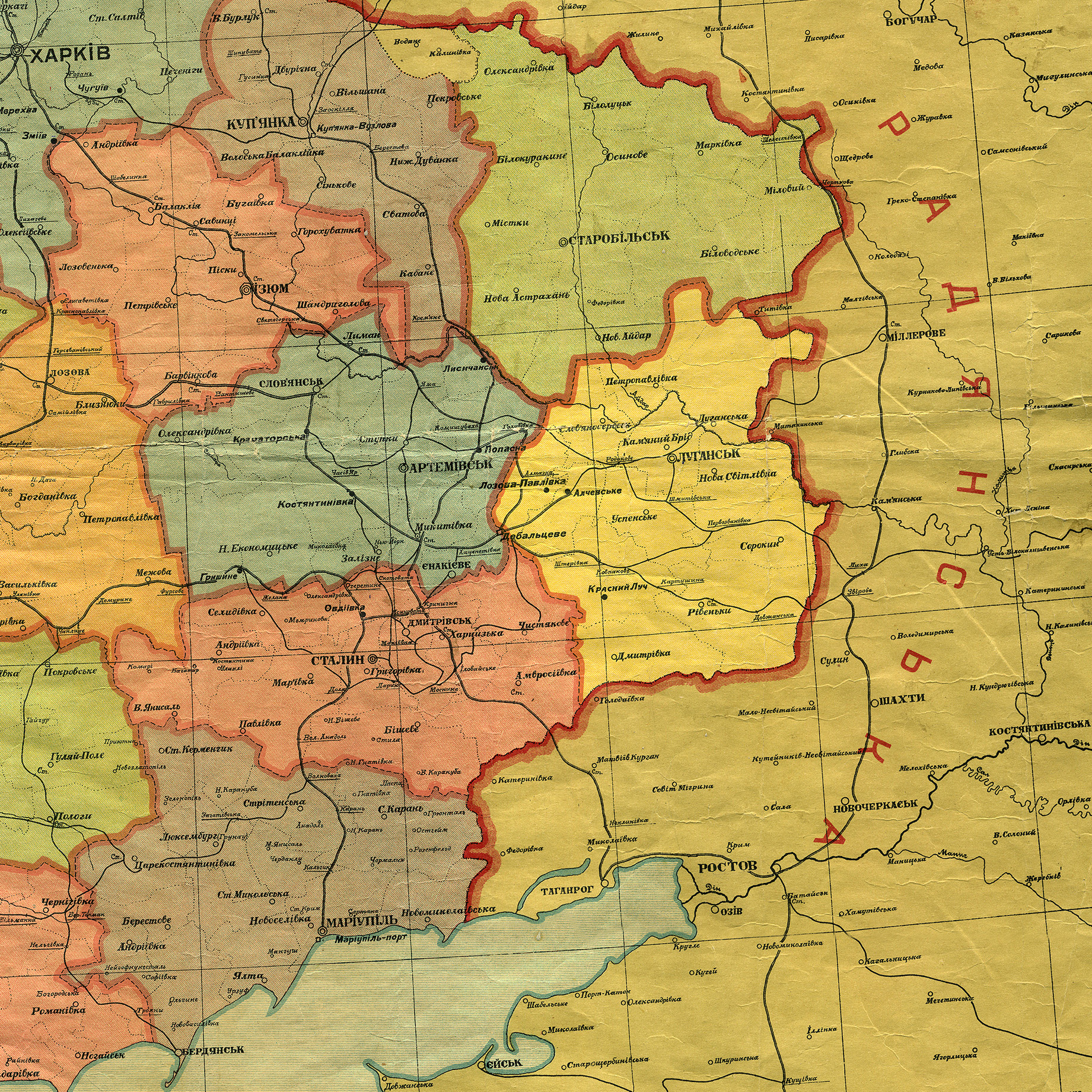 Територія колишньої Донецької губернії, фрагмент мапи Української соц. рад. республіки, адміністративний поділ від 1 жовтня 1925